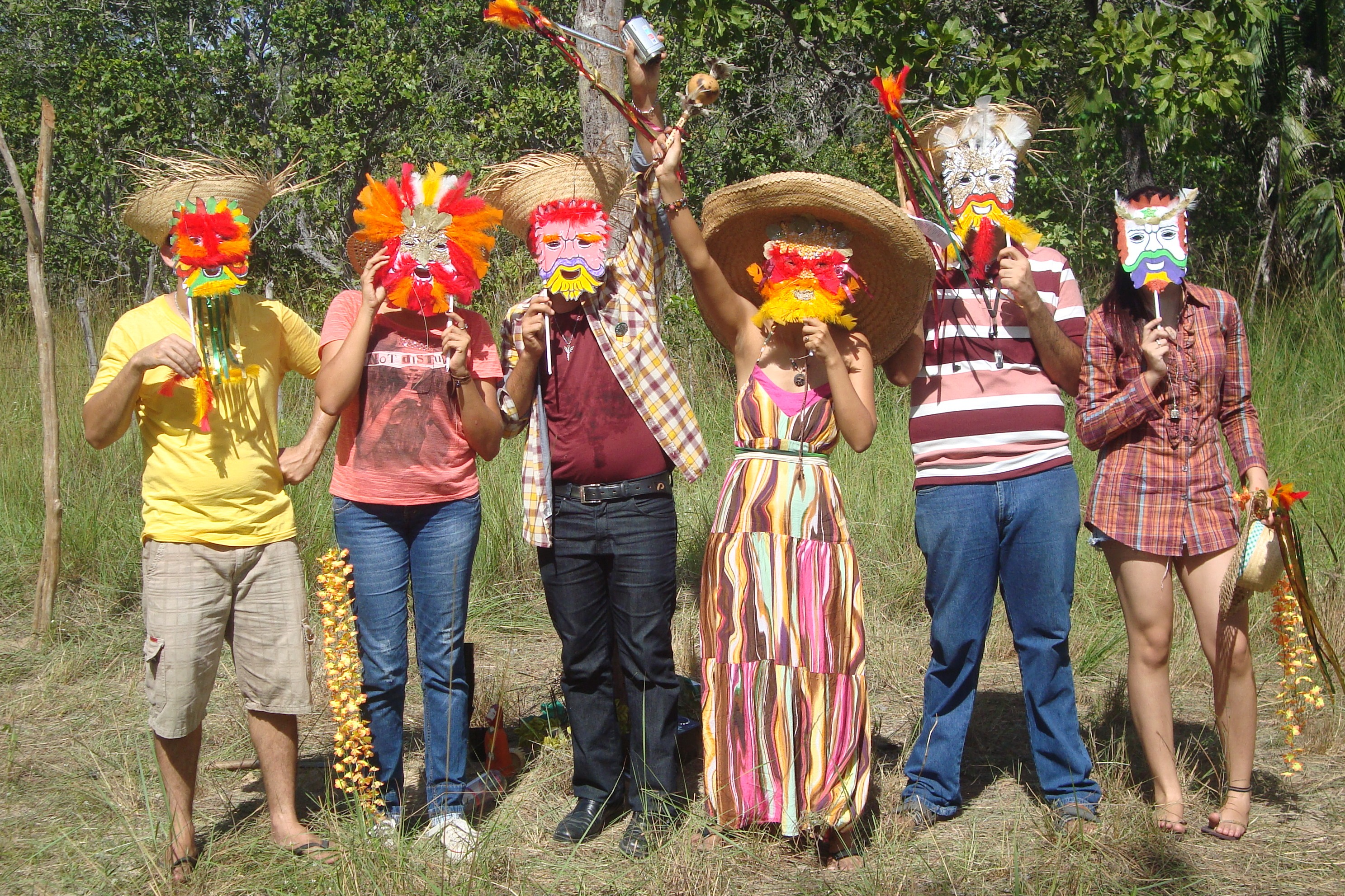 Registro da celebração pagã do festival de Robigália, realizado anualmente por colonos da Vila Pagã, comunidade localizada no interior do Piauí